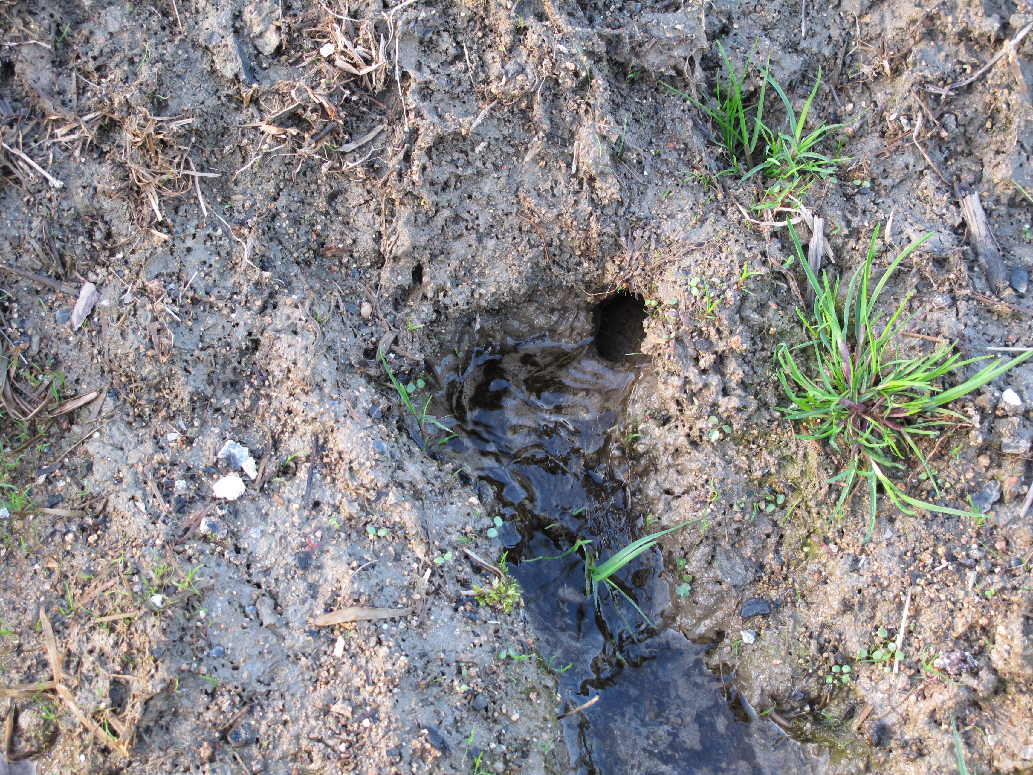 Tremblatský potok. Okres Praha-východ, Česká republika.